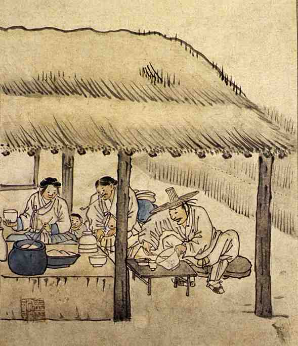 주막(酒幕), 단원풍속도첩(檀園風俗畵帖)에서 종이에담채, 27cm x 22.7cm, 국립 중앙박물관 소장